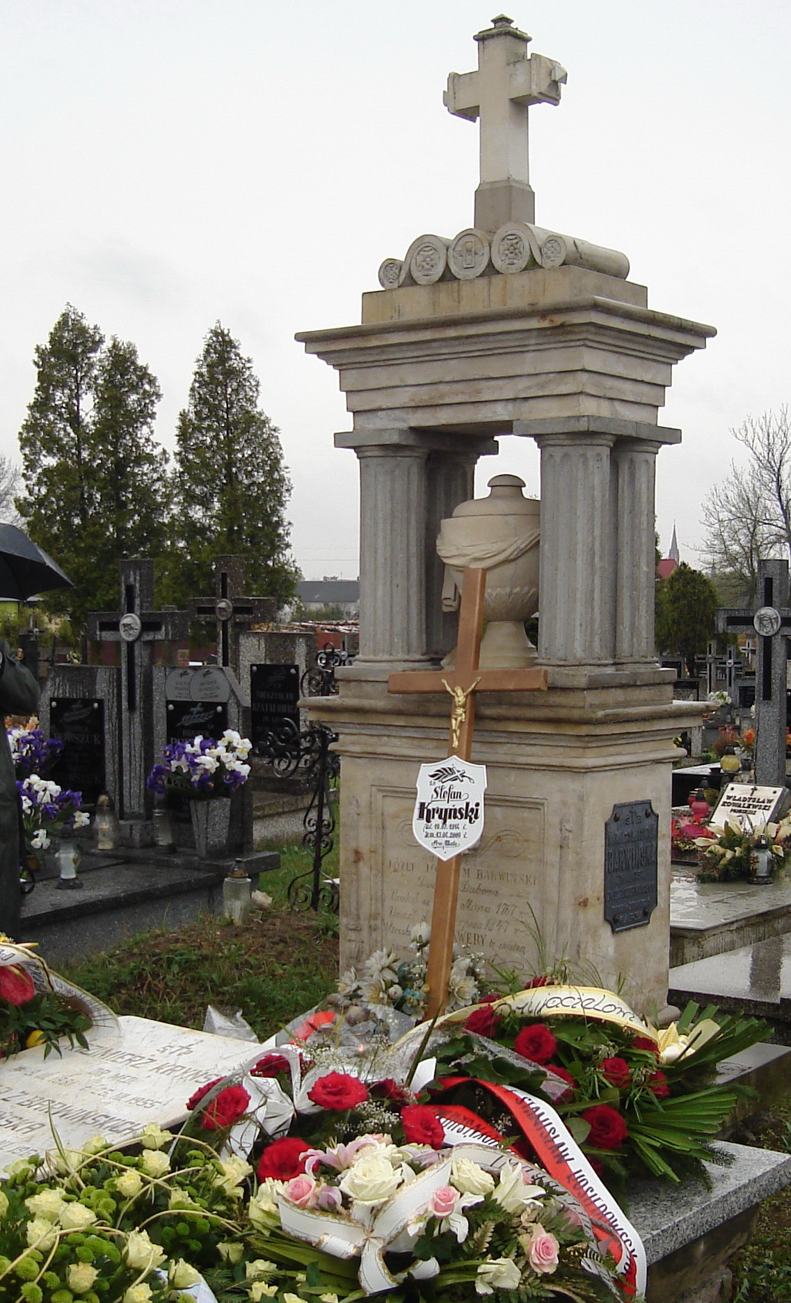 Łomazy k. Białej Podlaskiej. Grobowiec Barwińskich z I połowy XIX w., w którym pochowany jest prof. Stefan Kryński i jego rodzice: ojciec Kazimierz i matka Felicja z Barwińskich